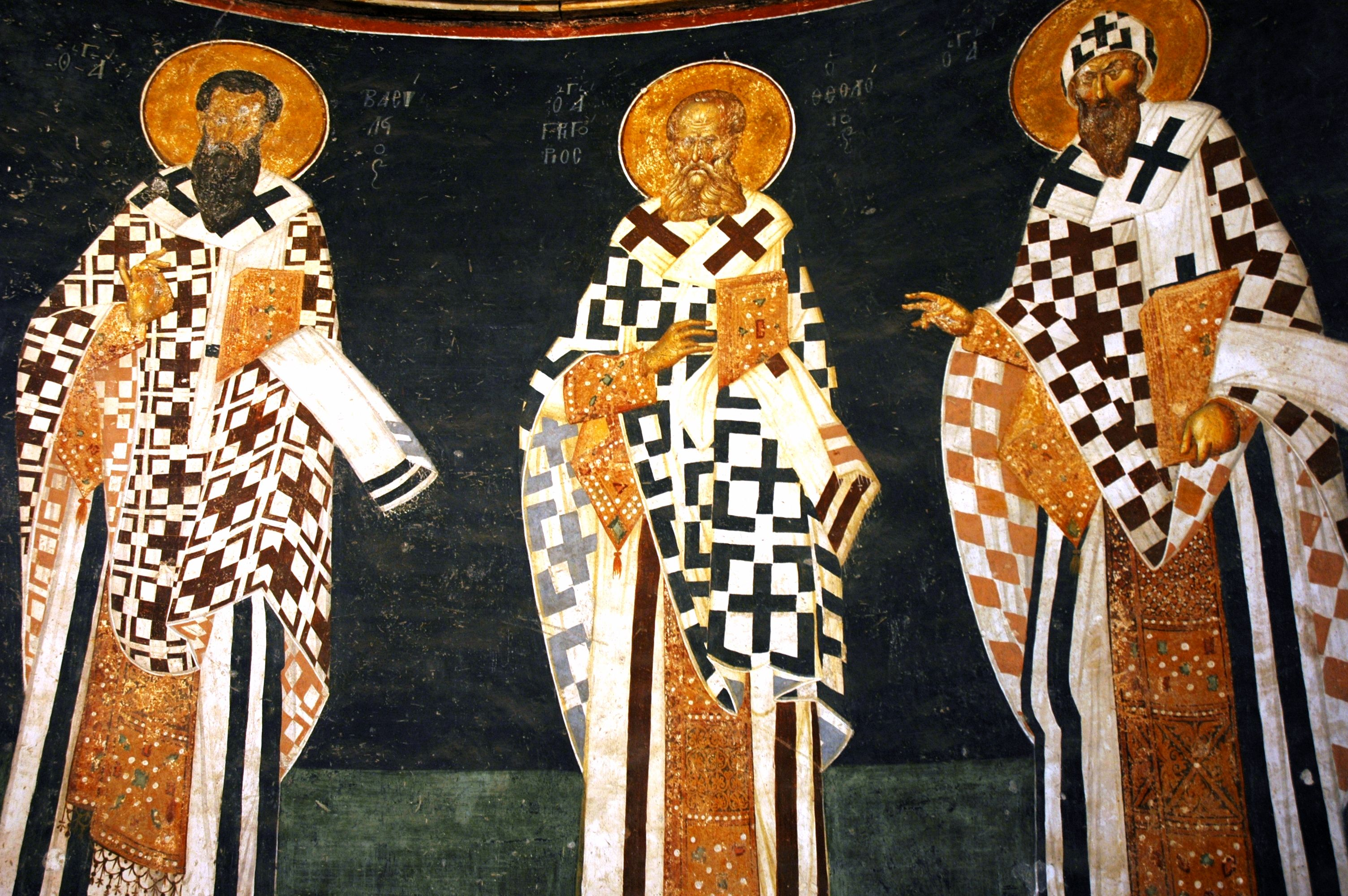 Sant Salvador de Khora - Pintures de l'absis